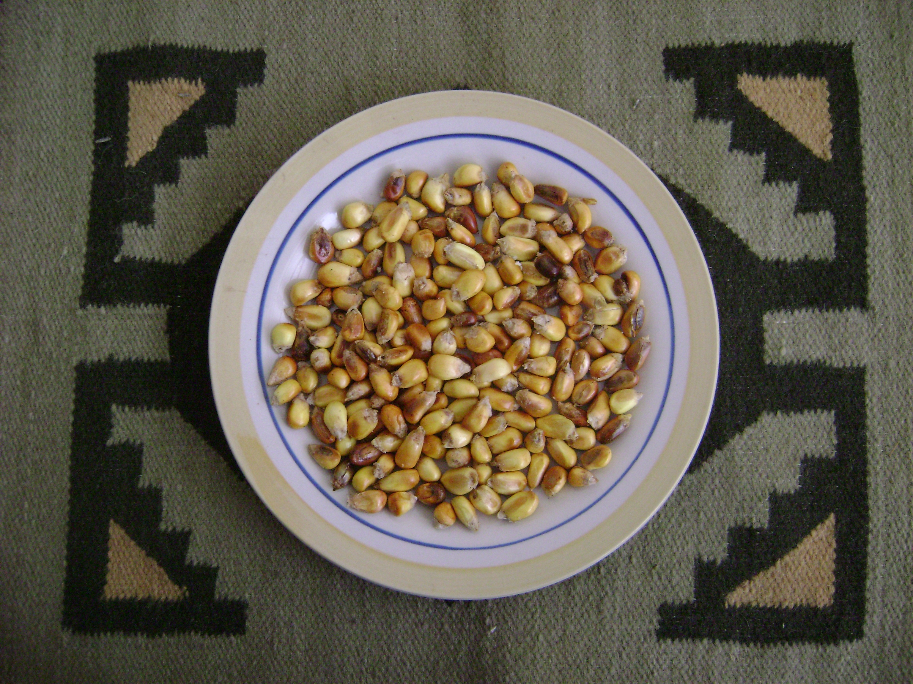 Plato de cancha serrana.